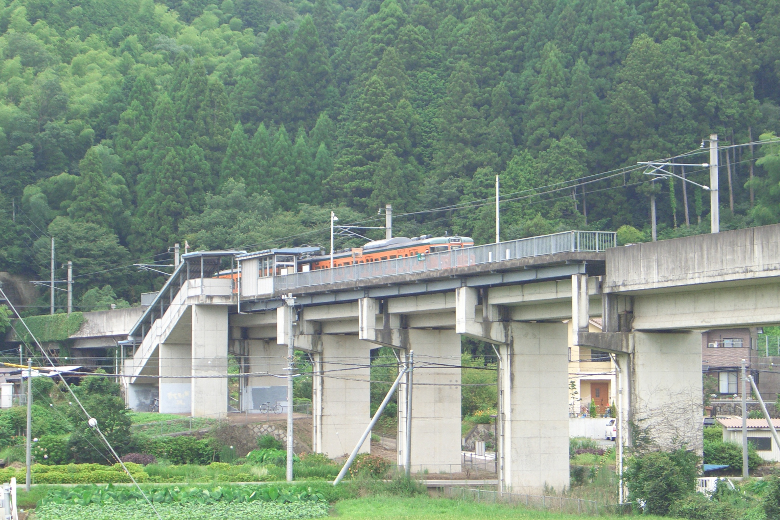 北近畿タンゴ鉄道宮福線大江高校前駅の遠景。京都府福知山市大江町金屋。